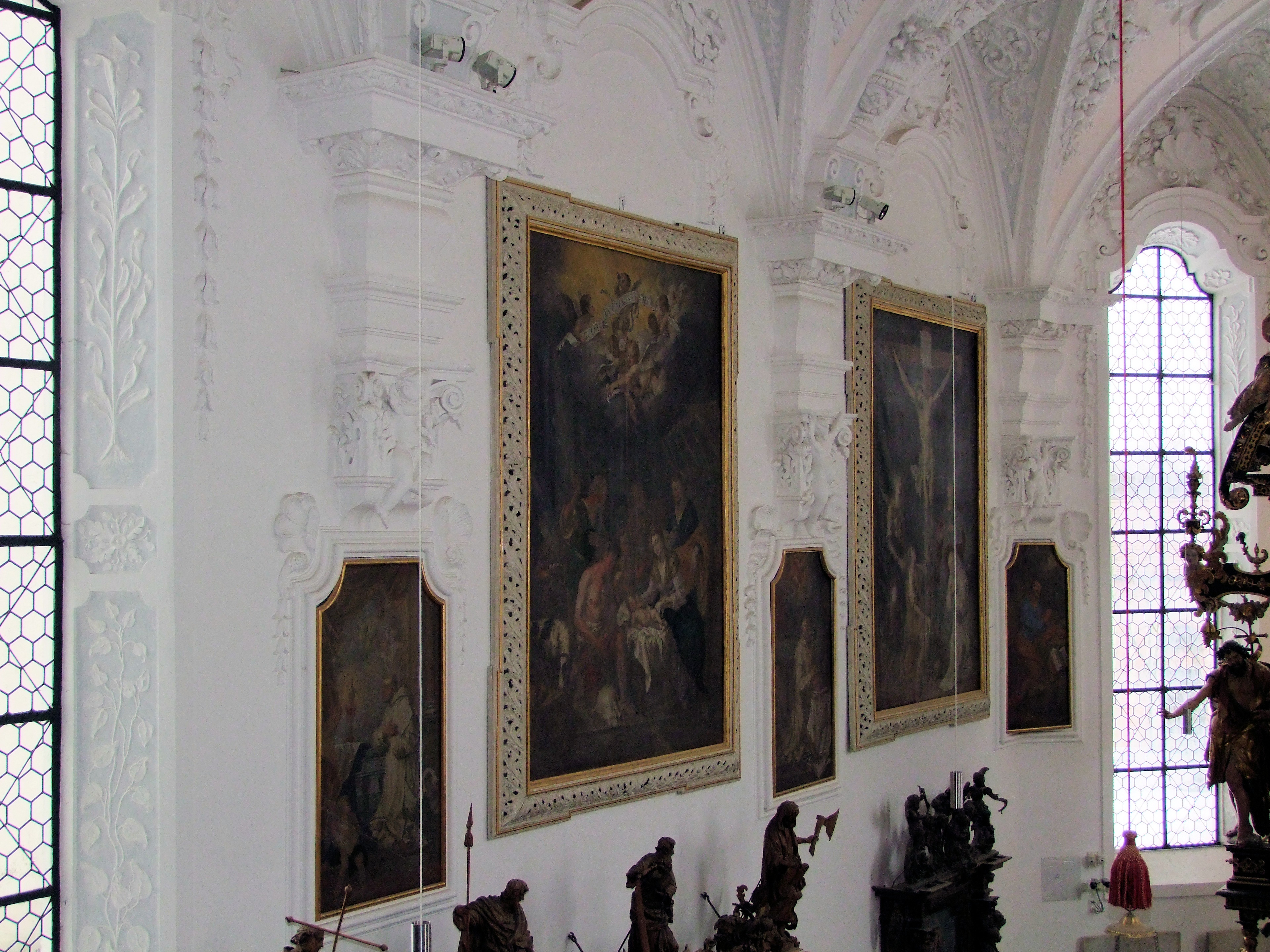 St. Maria im oberschwäbischen Buxheim bei Memmingen. Leinwandbilder an der Südseite des Priesterchores.